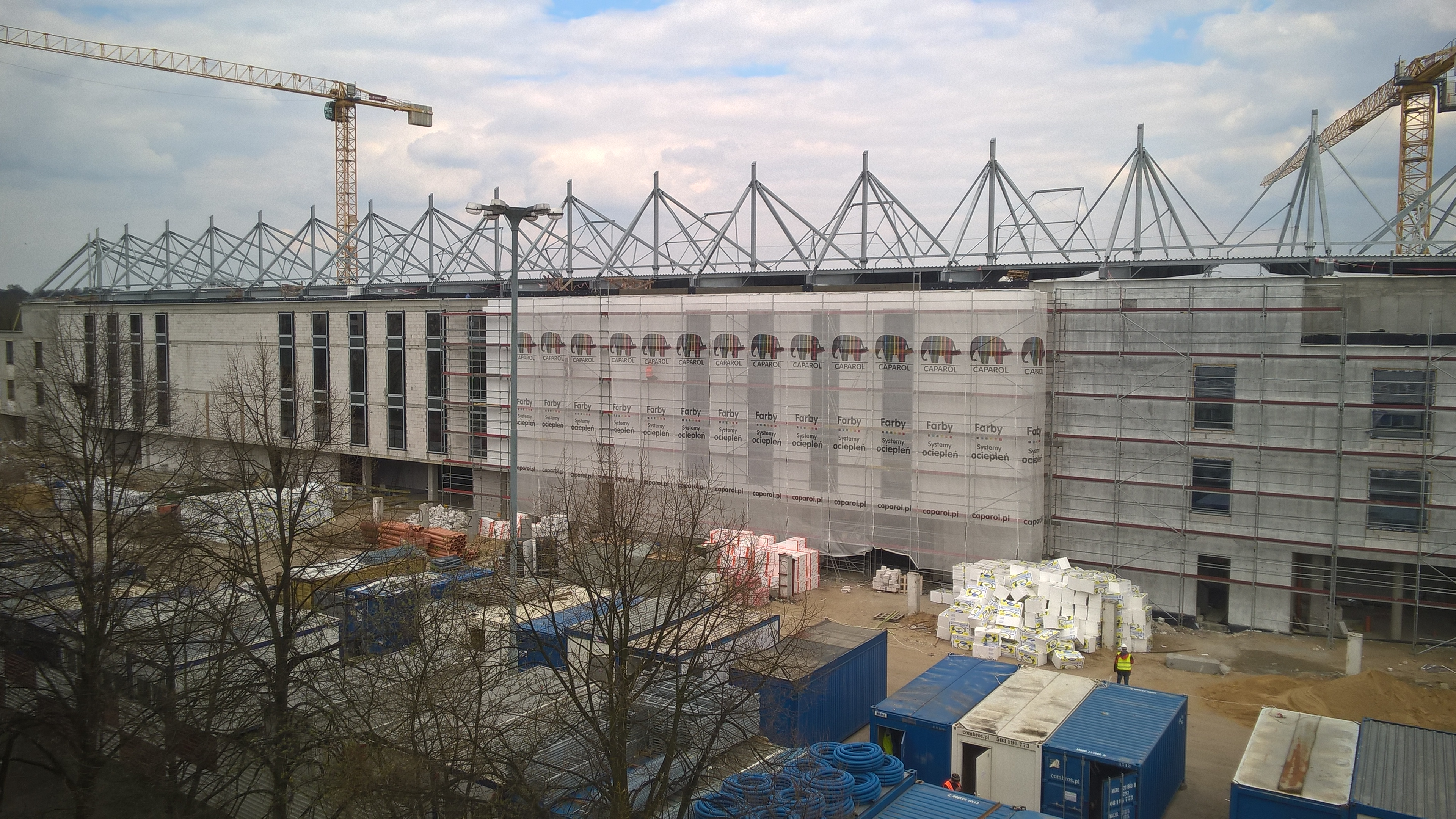 Budowa stadionu Widzewa Łódź - kwiecień 2016